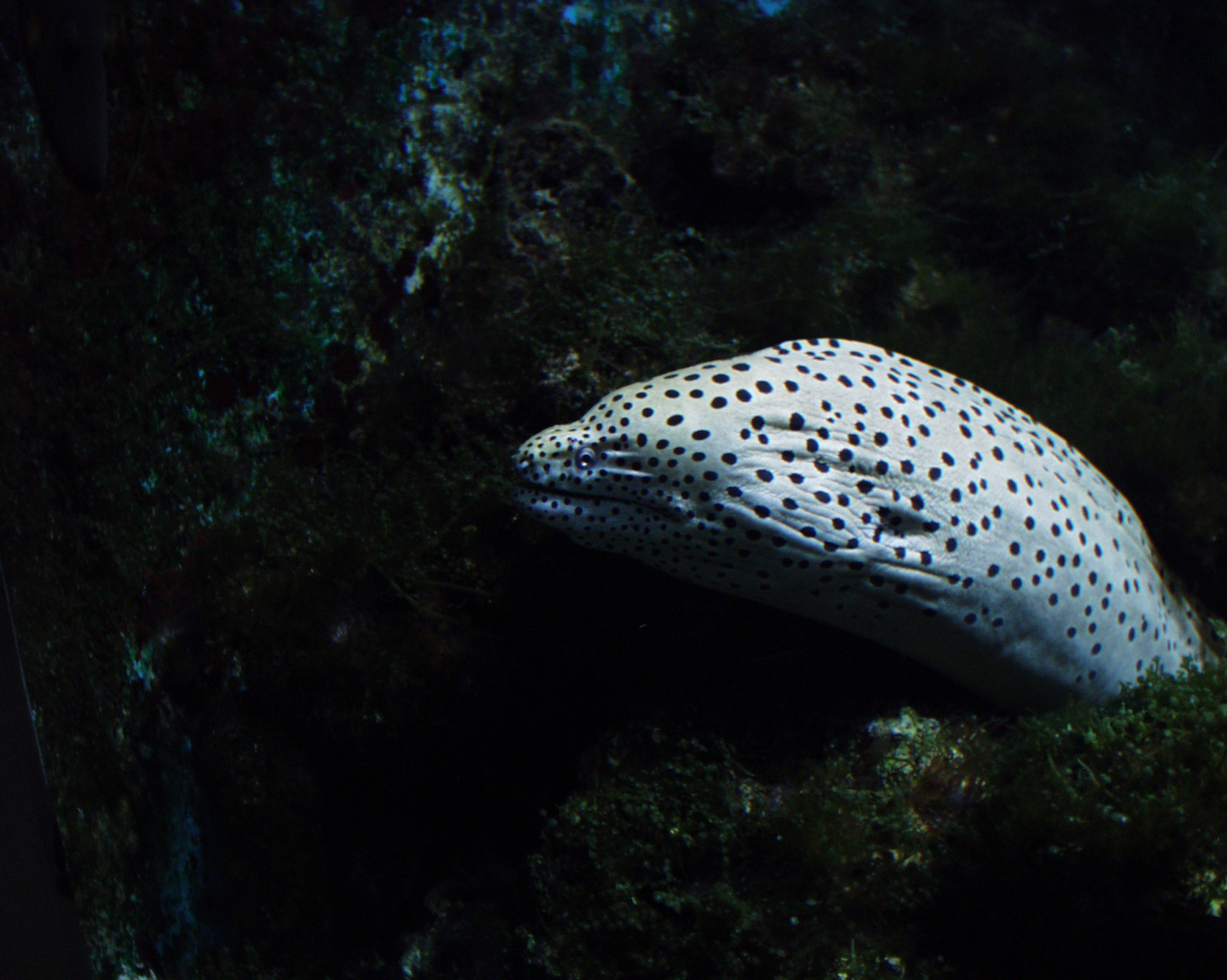 Gymnothorax isingteena Schwarztupfen-Muräne